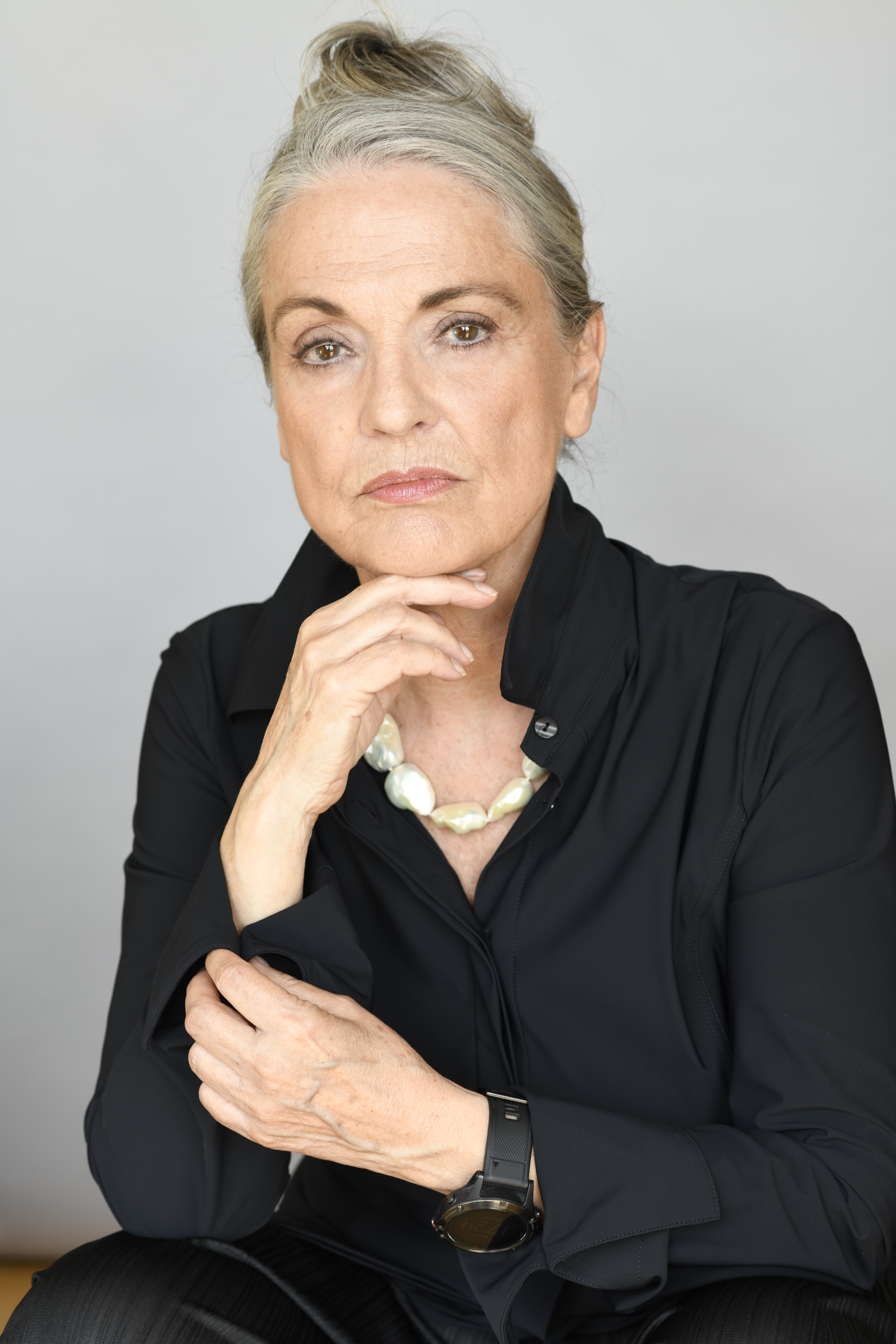 Porträt von Benita Cantieni